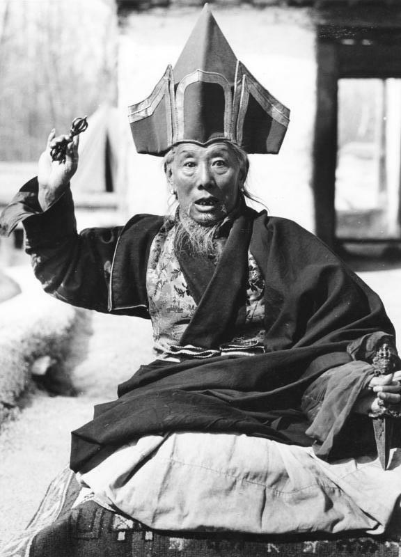 Tibetexpedition, Fürst von Gautsa Lhasa, Fürst von Gautsa in der Mudrastellung [Gautsa, Gotsa; Tibeter in Tracht]